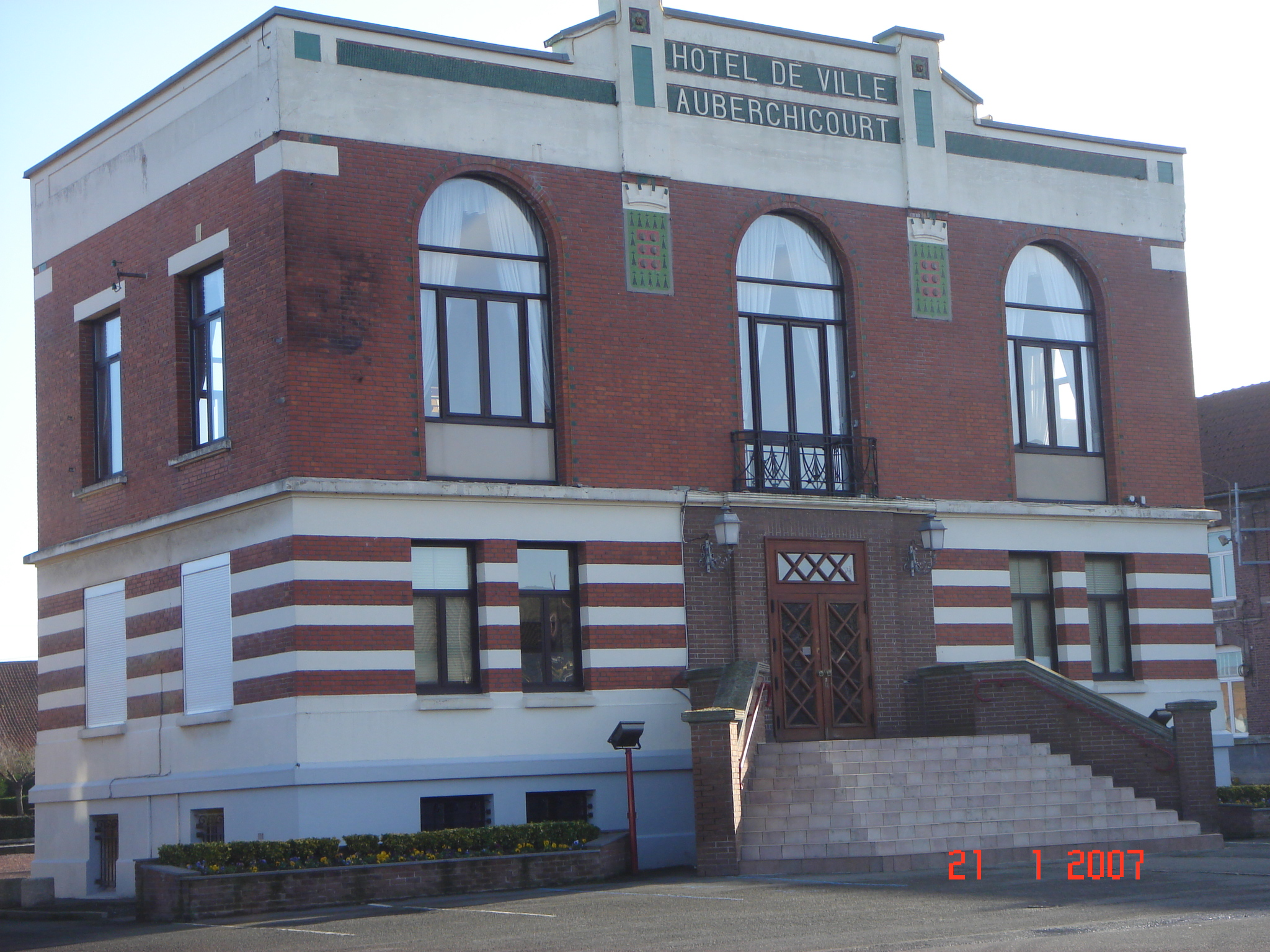 Auberchicourt L' Hotel de ville